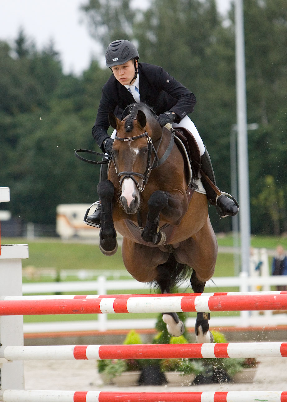 Matas Petraitis su žirgu Bacardi CSI - W Vazgaikiemis 2011